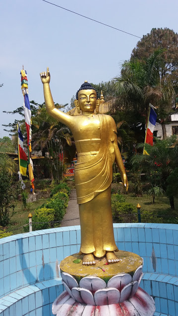 नेपाली: पोखराको मुस्ताङ गुम्बाको परिसरमा रहेको बुद्धको प्रतिमा